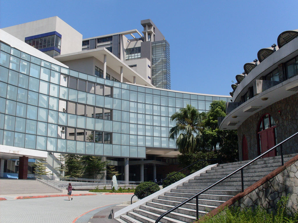 輔大醫學院